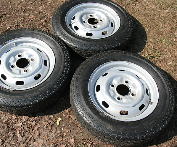 Vredestein Sprint ST 155 SR 15 tires on Volkswagen Beetle mounts.